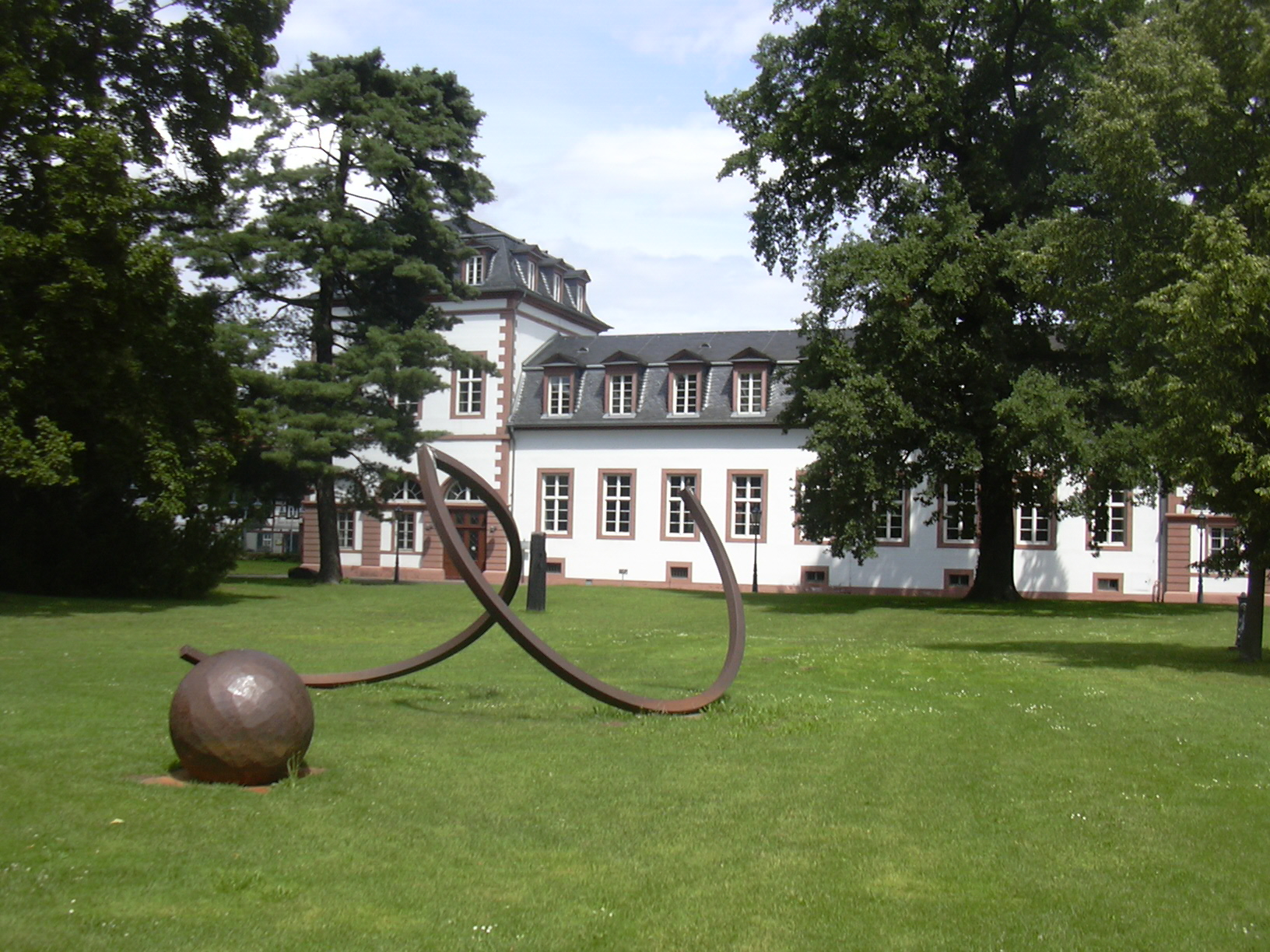 Philippsruhe Castle, Corps de Logis, with sculpture Grosse Kreisstellung mit Kugel (1988) by Alf Lechner near Hanau, Hesse/Germany